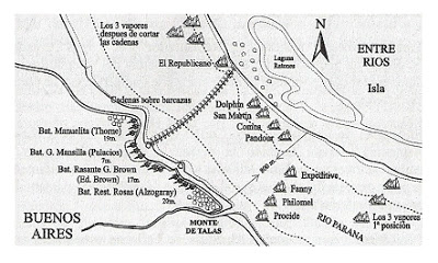 bataille navale franco anglaise contre l'Argentine à vuelta de obligado 1845